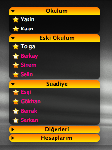 C'est un exemple de liste de contact que l'on peut obtenir avec Adium, modifiable à votre guise et comme vous le voulez.